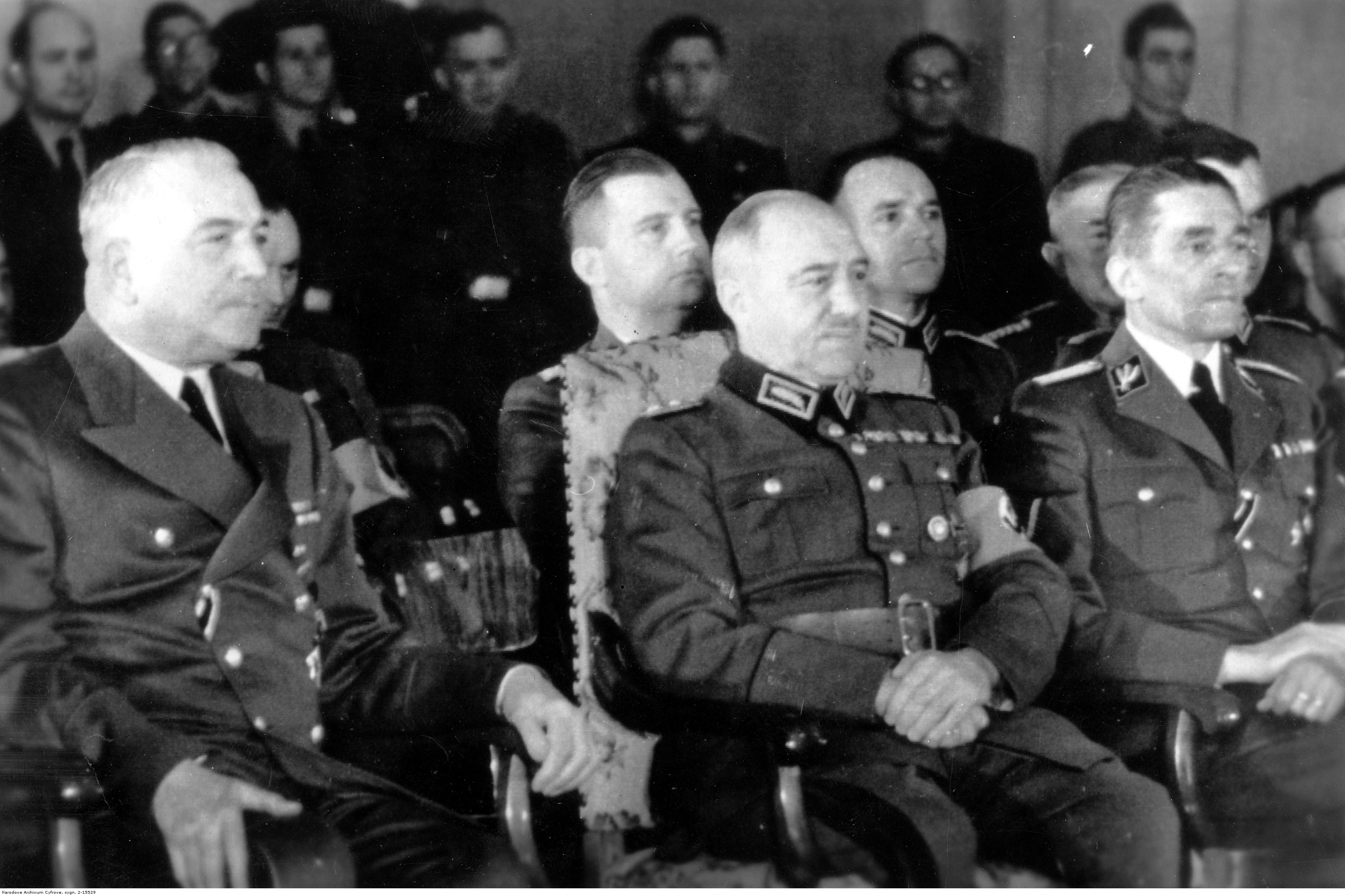 Konstantin von Neurath, Konstantin Hierl, Karl Hermann Frank